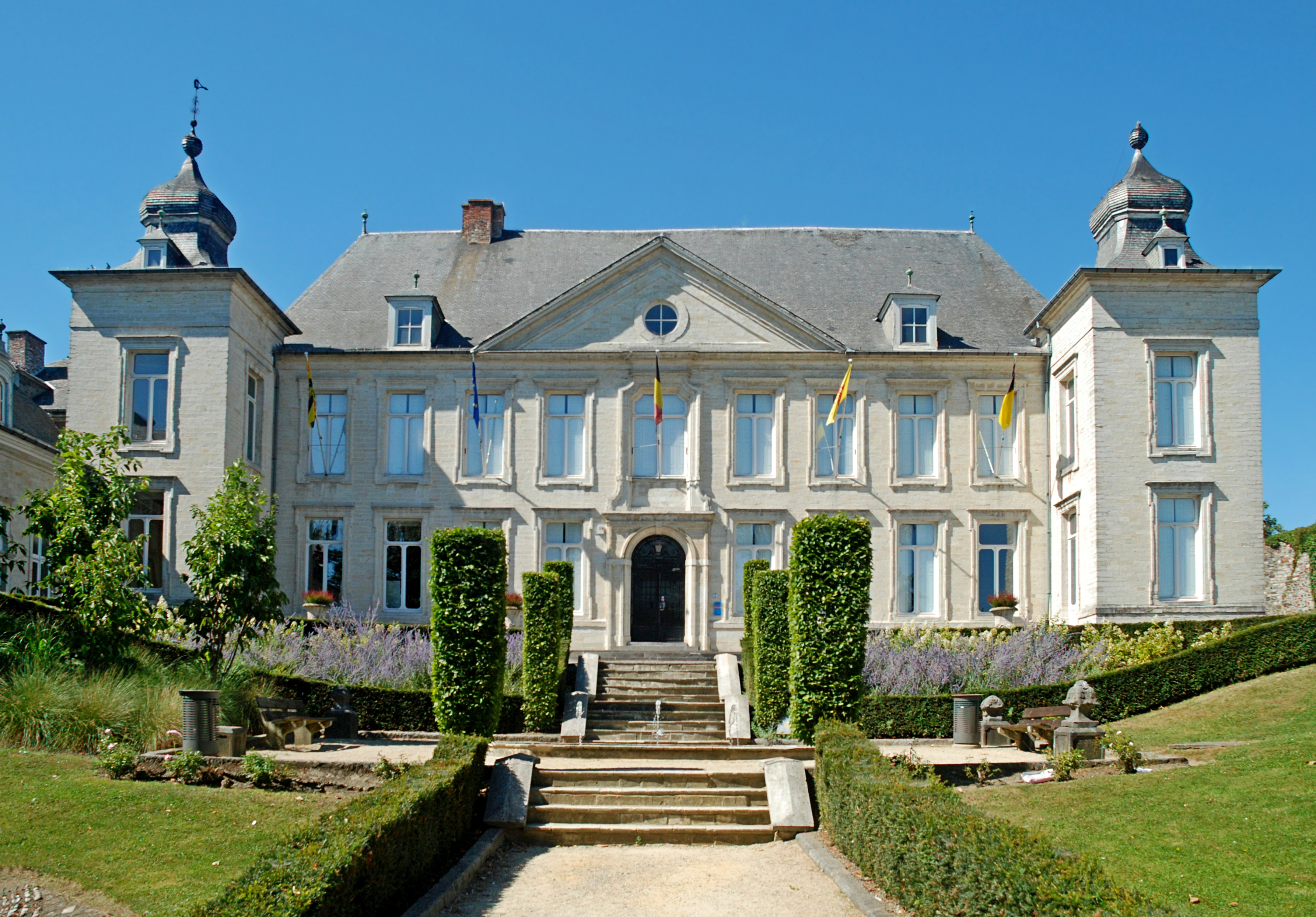 Belgique - Brabant wallon - Château Pastur